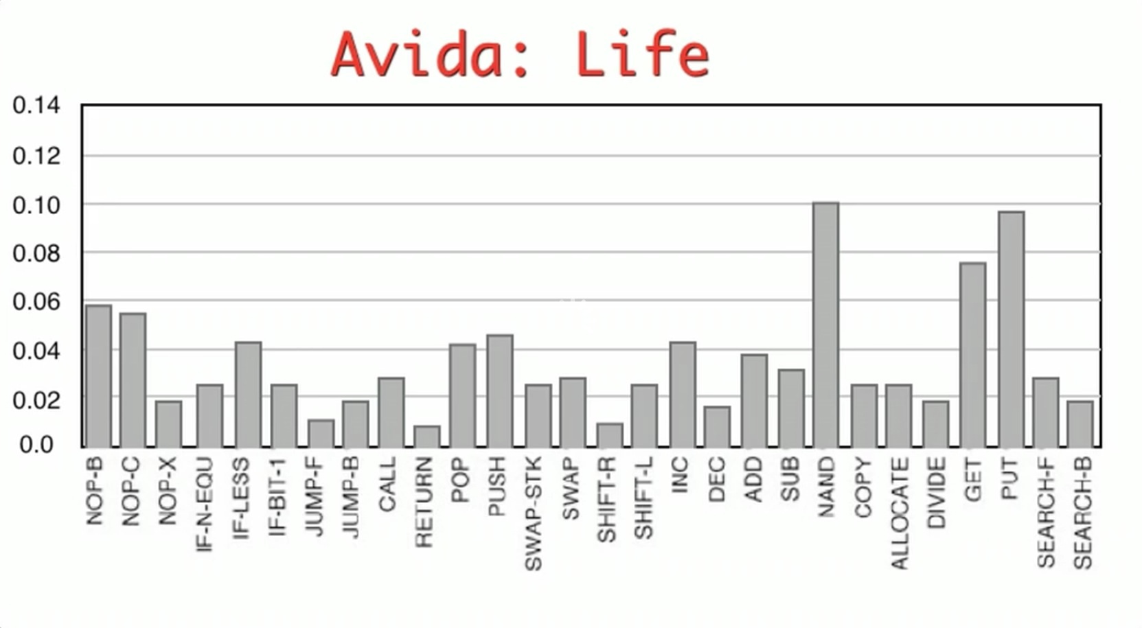 Réparation des codes informatiques dans un environnement avidien vivant.